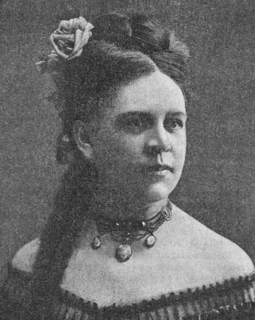 Theresia Saxenberg, svensk operasångerska.